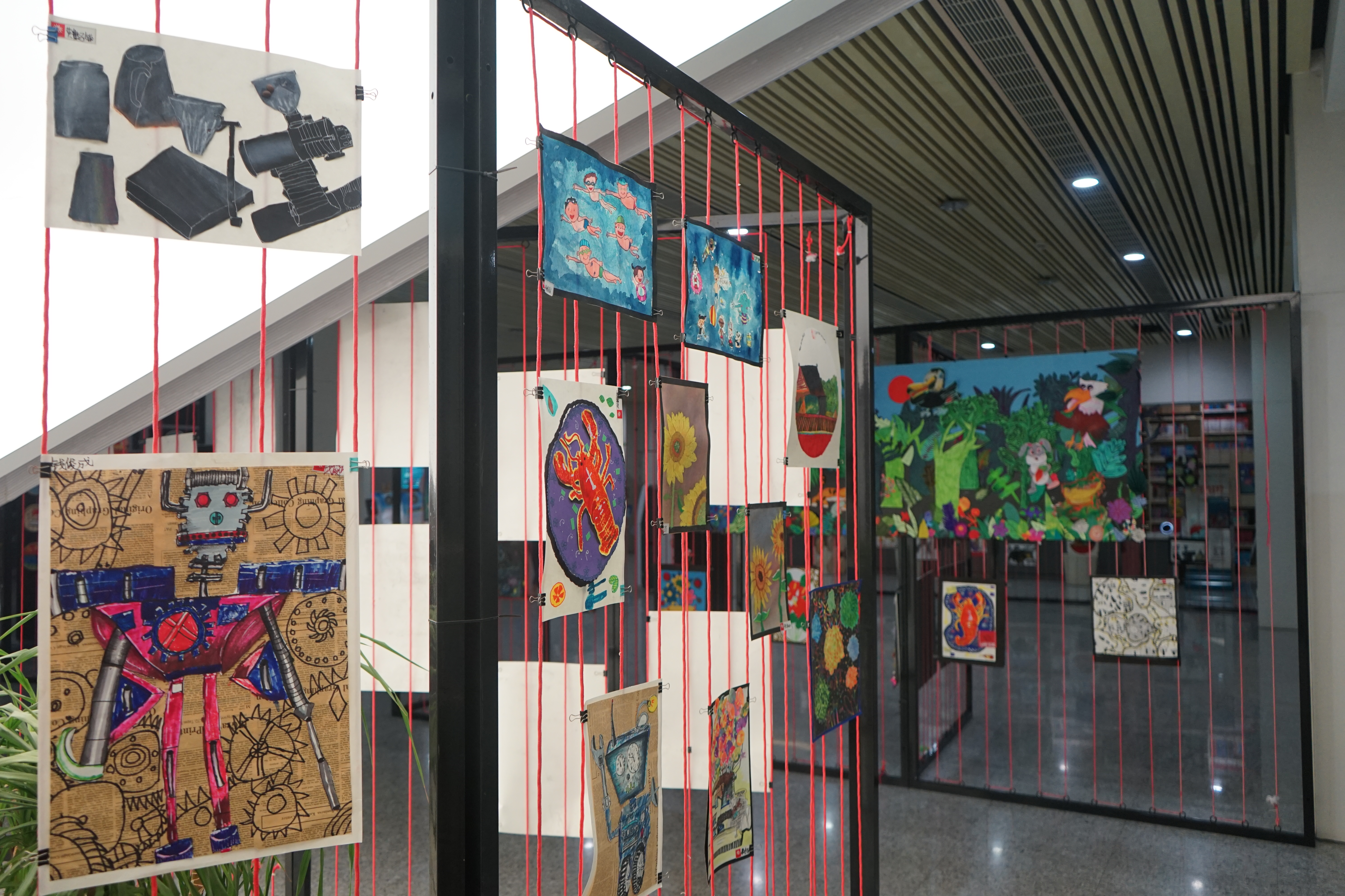 中文（中国大陆）: 海宁图书馆